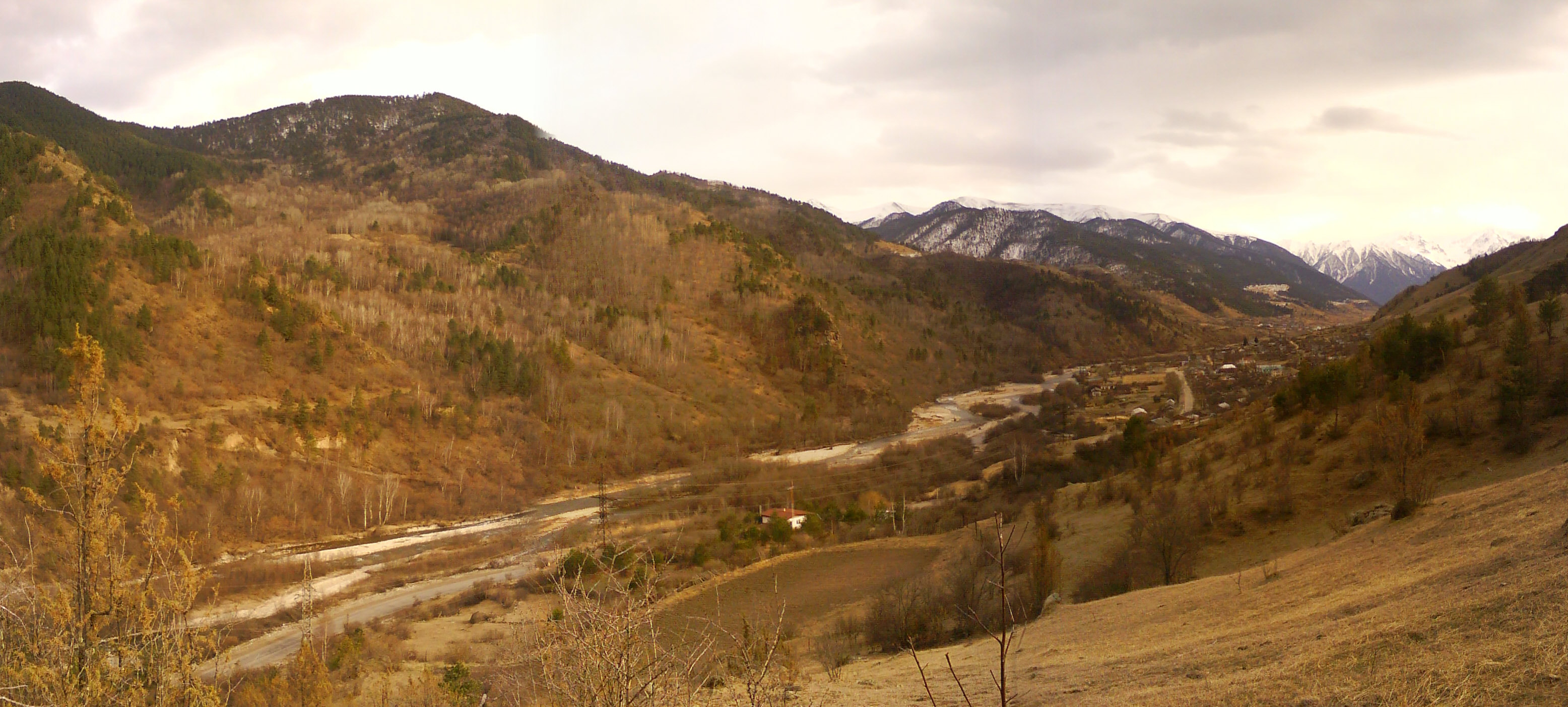 Пос. Эльбрусский